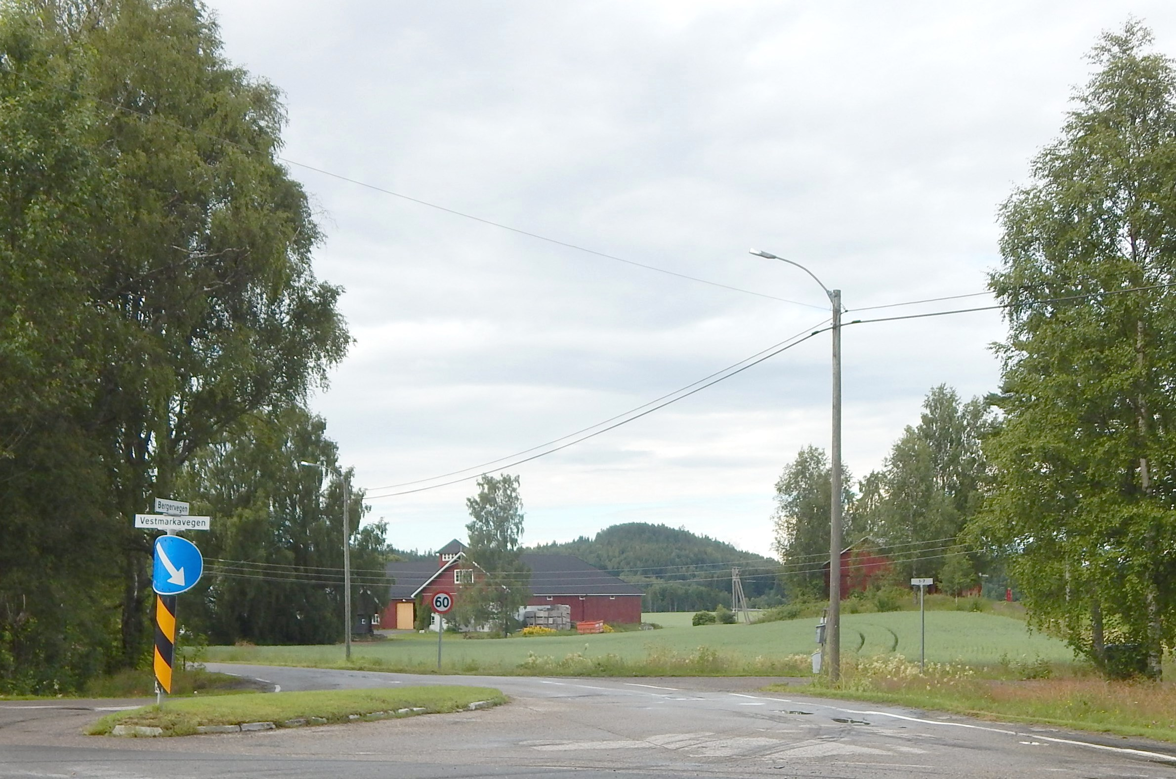 Bergervegen (fylkesvei 1972, tidl. 332) sett fra fylkesvei 21